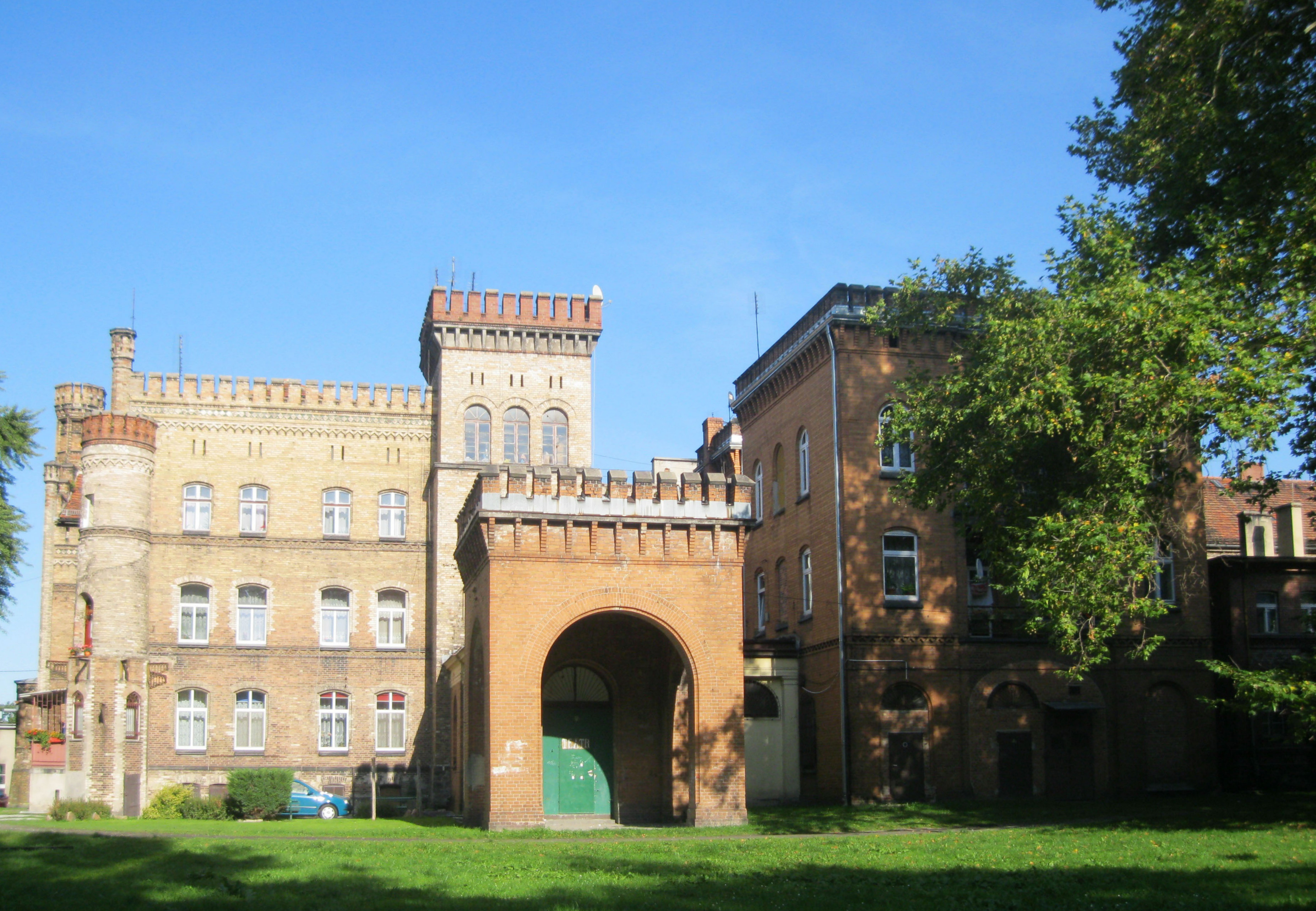 Żarów - park miejski z aleją dębową, 1860